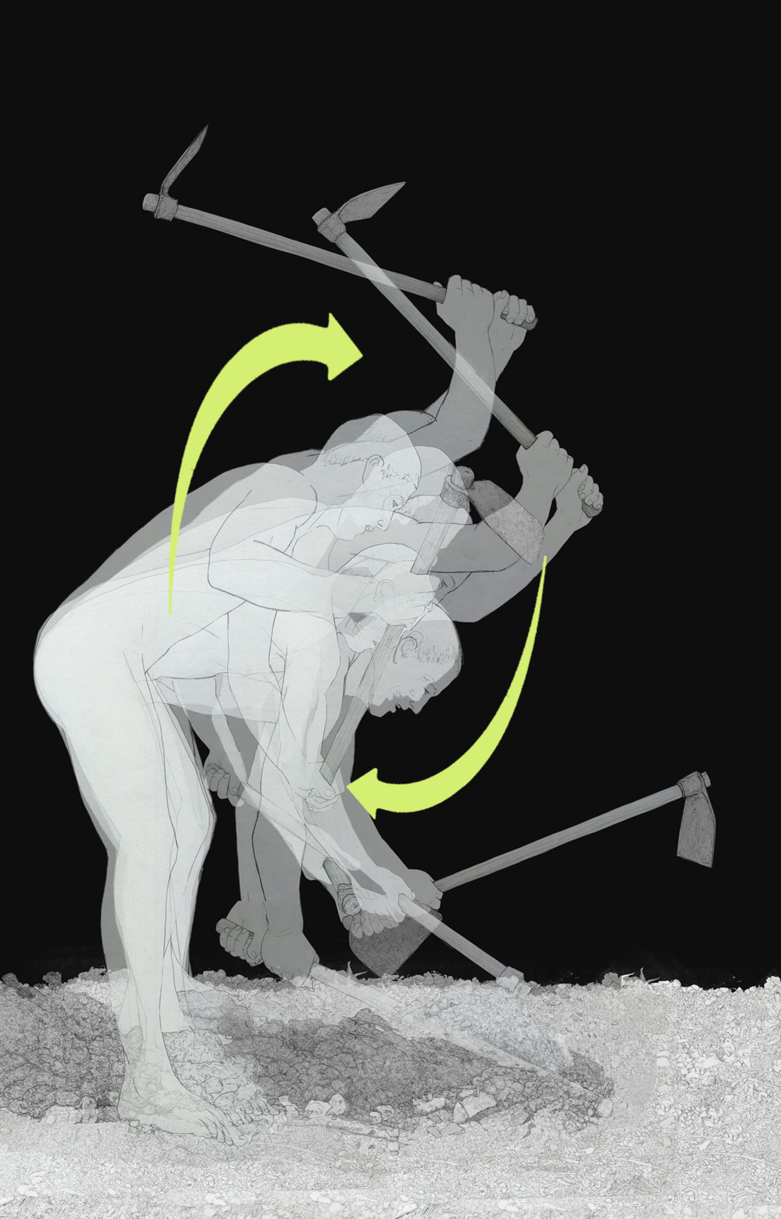 Moviments del llaurador valencià a l'hora de cavar